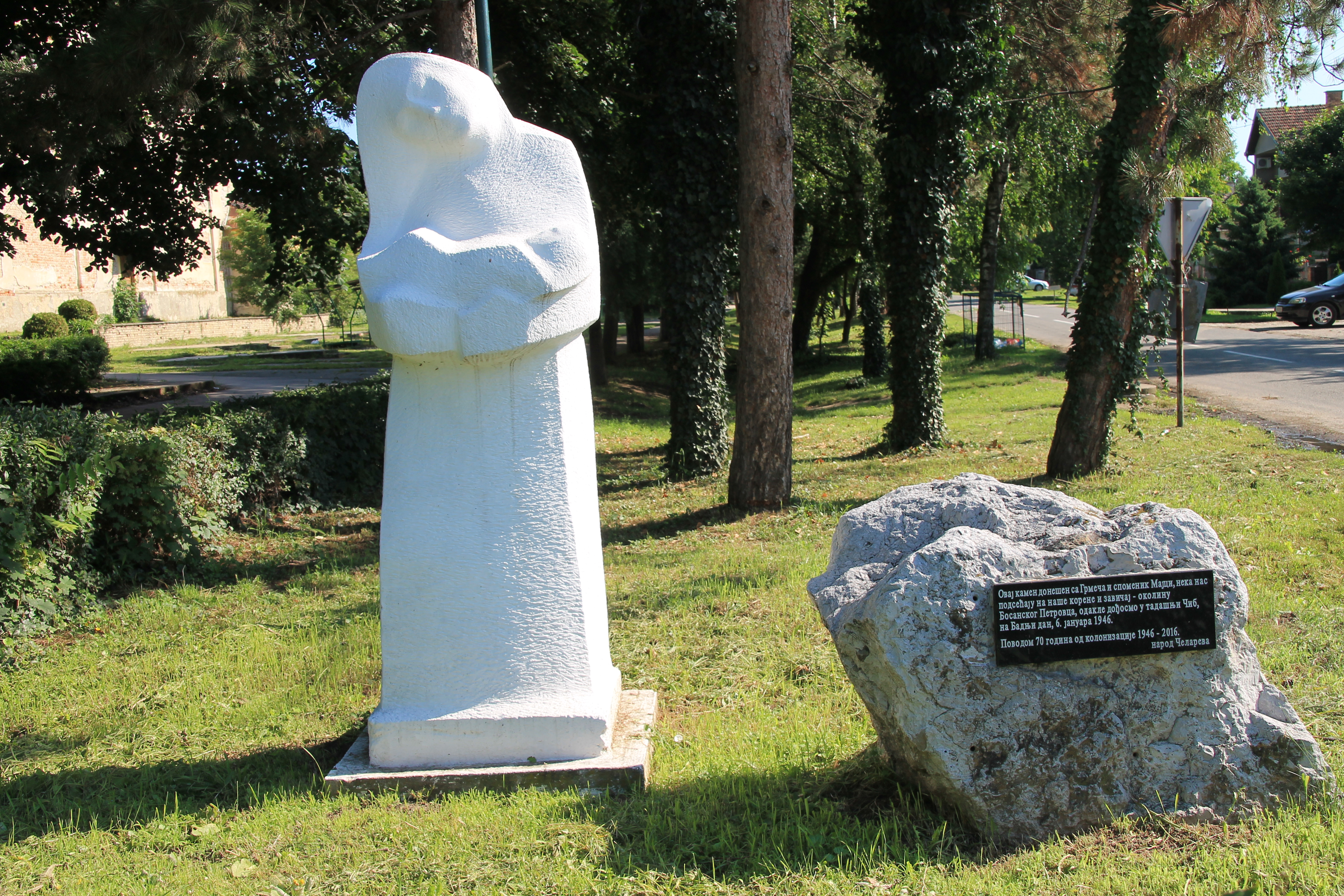 Spomenik majci